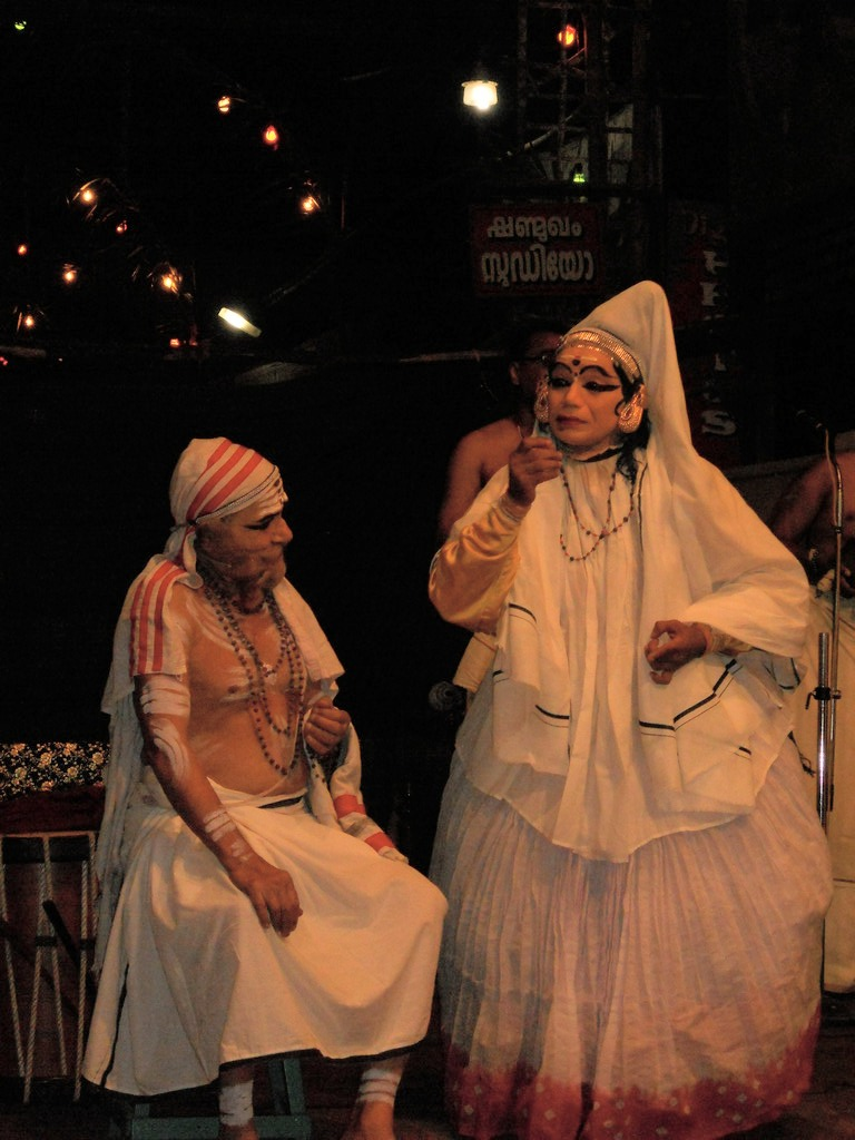 മടവൂര്‍, കലാമണ്ഡലം രാമചന്ദ്രന്‍